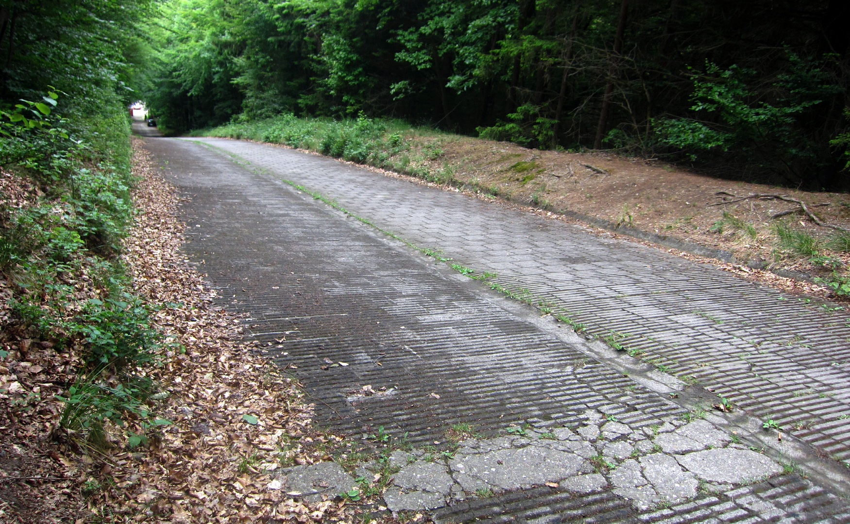 Die "Steilstrecke" an der Nürburgring-Nordschleife zwischen den Streckenbereichen "Klostertal" und "Hohe Acht" wurde 1926-1928 als mögliche Abkürzung der Strecke erbaut.